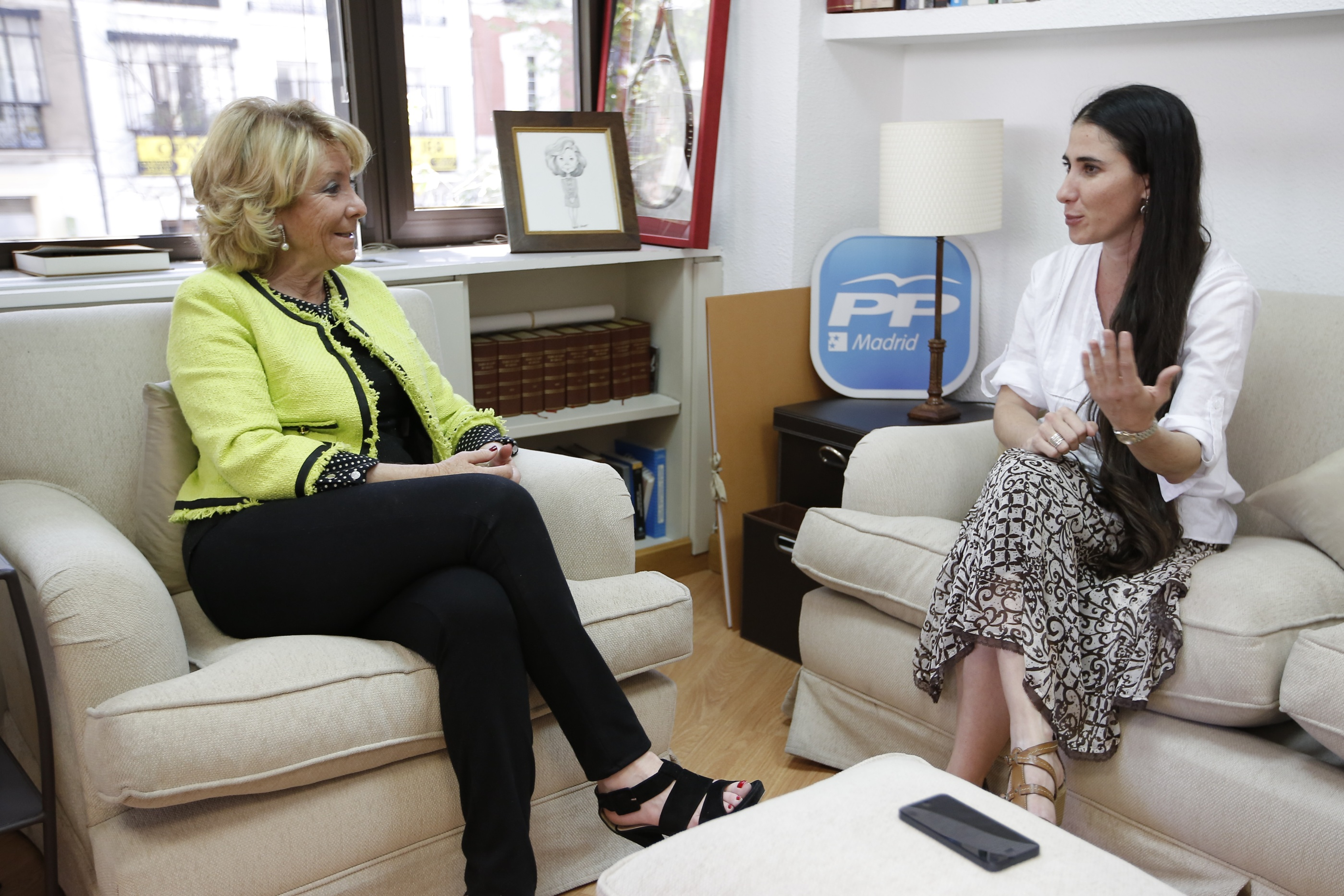 Encuentro Esperanza Aguirre con Yoani Sánchez